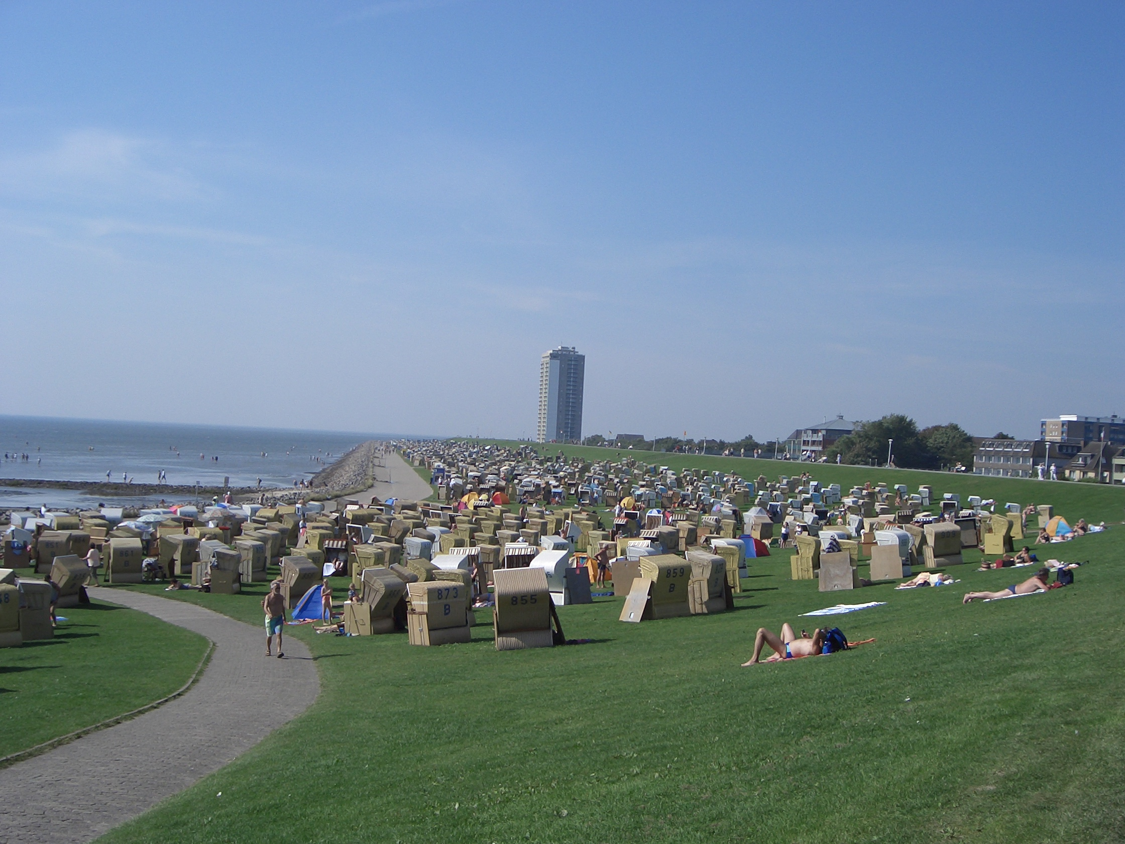 Büsumer Strand